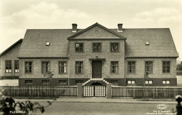 Fleninge kommunalhus på 1920-talet.